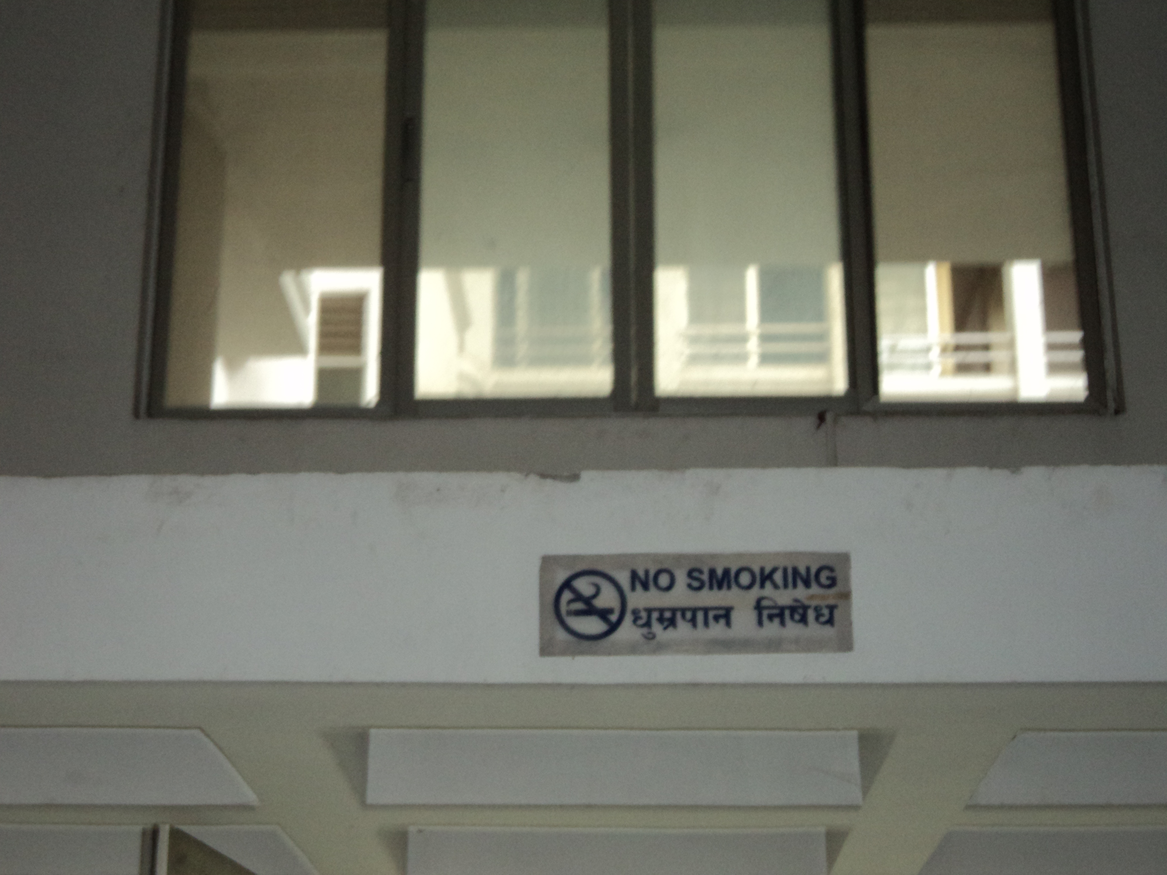 नेपाली: अग्रवाल सेवा केन्द्रमा धुम्रपान गर्न पाईदैंन।